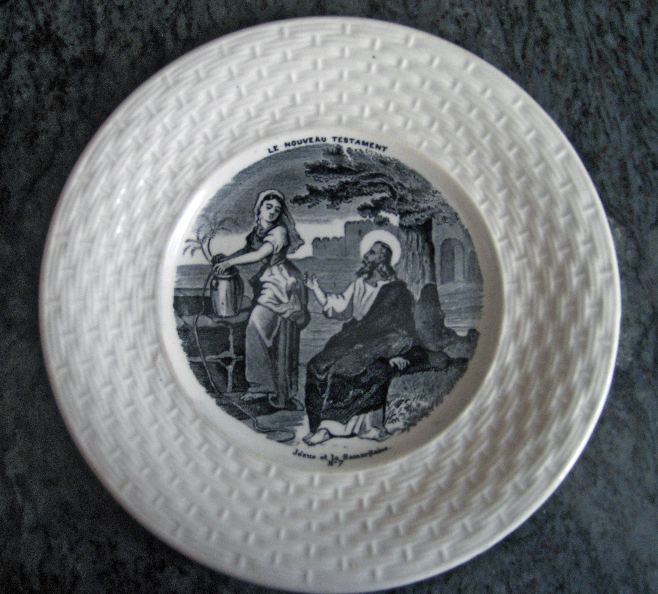 Plato de porcelana de Gien (Francia) de la serie Le Nouveau Testament Final del siglo XIX o principio del siglo XX